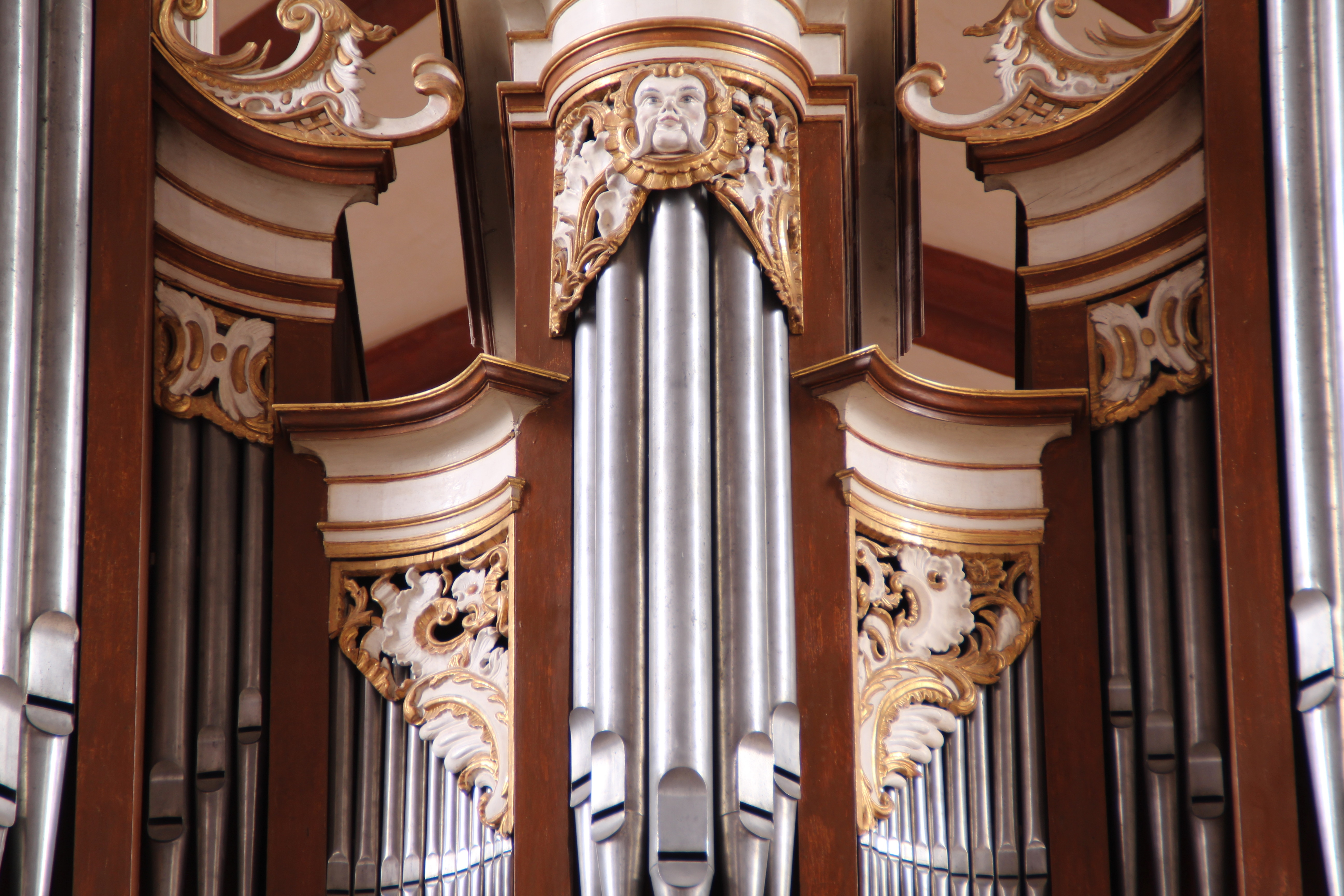 Details der Schnitzarbeiten am Hauptwerks-Prospekt der Schöler-Orgel der Klosterkirche zu Soms-Altenberg